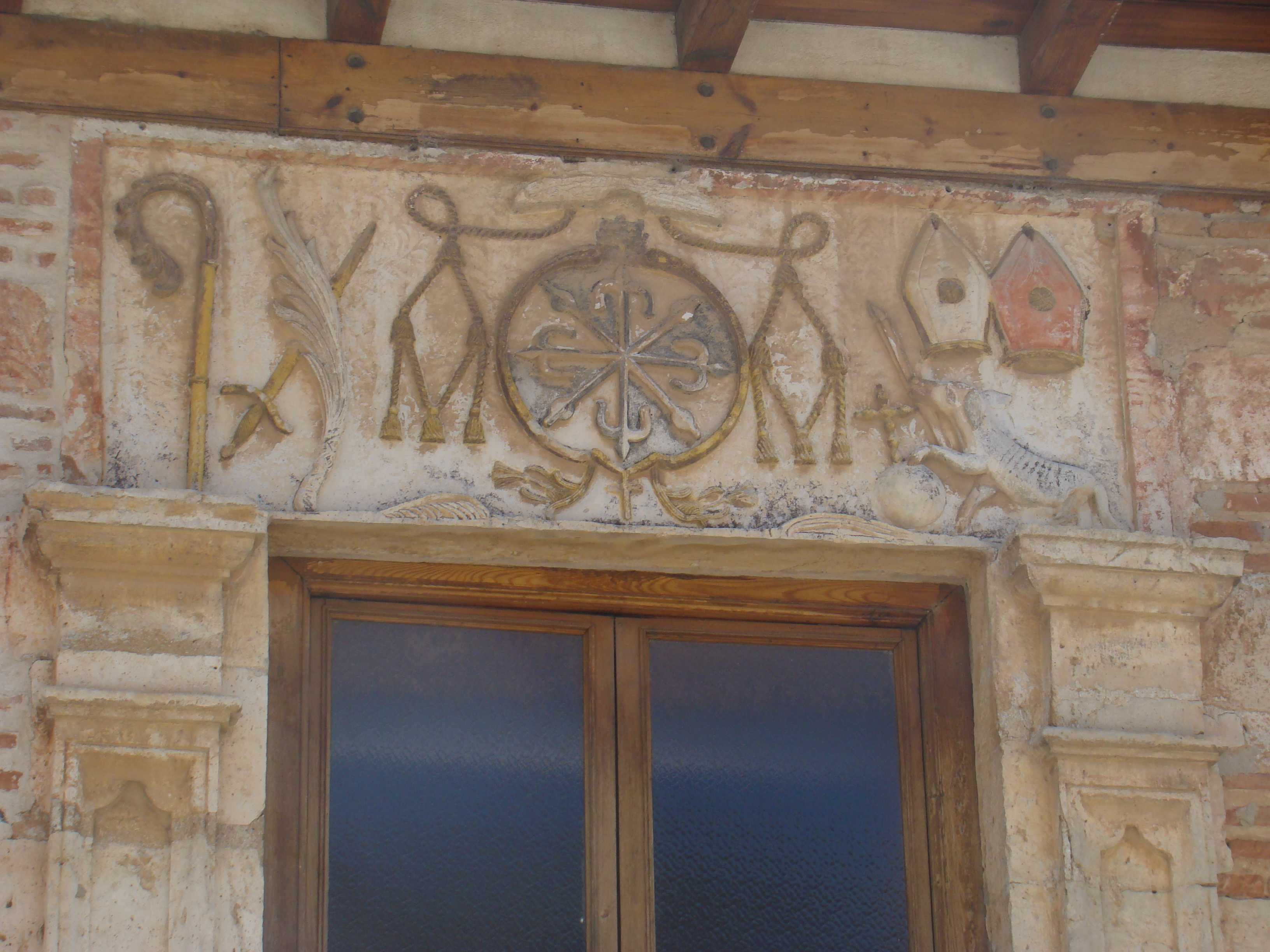 Casa Quijada Alcalde. Casa del siglo XVIII ubicada en la calle El Campillo de Cigales, Valladolid. Construida en piedra y ladrillo perteneció a la familia Quijada Alcale, familia a la que pertenecía el Obispo de Yucatán y Guadalajara (en México) fray Antonio Alcalde. Ostenta por encima del balcón las armas nobiliarias de este personaje. Durante años fue la sede de Caja España y en el año 2014 se utiliza como Sala de Cultura.